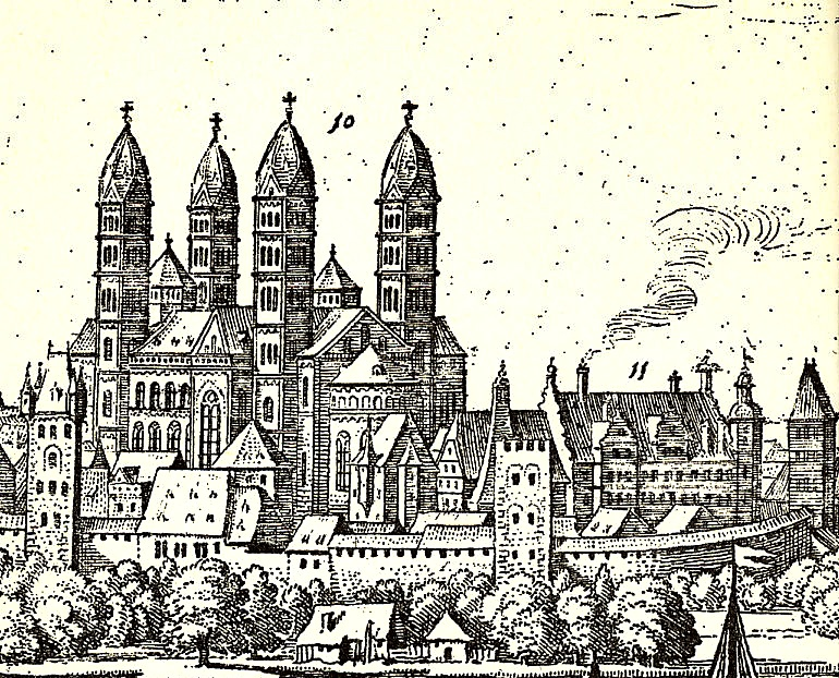 Speyer, Dom und Bischofspfalz (mit Nr. 11 bezeichnet), nach Matthäus Merian dem Älteren